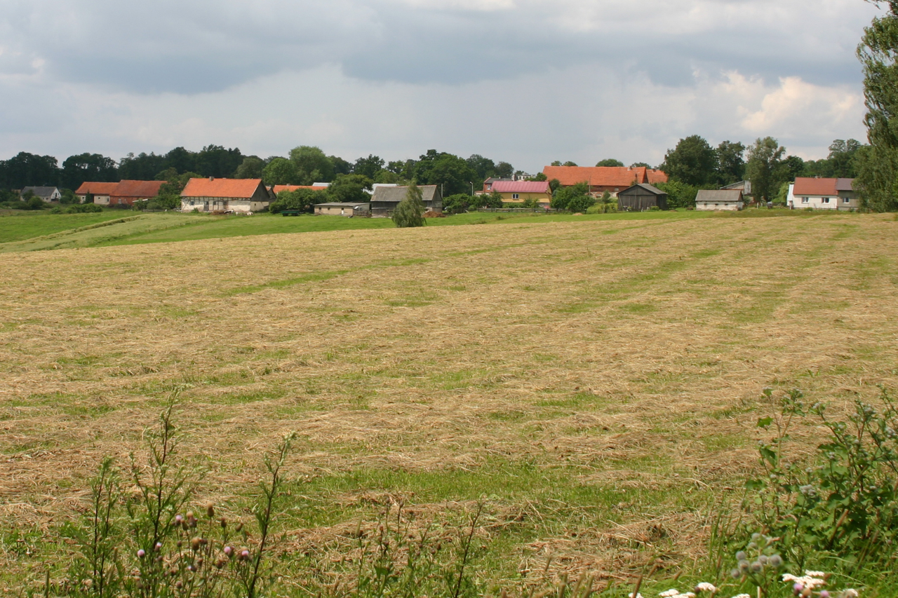 Siniec, Polska, powiat kętrzyński.